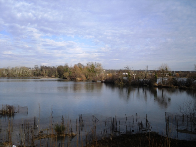 L'étang de la Place Verte à Grigny (91)